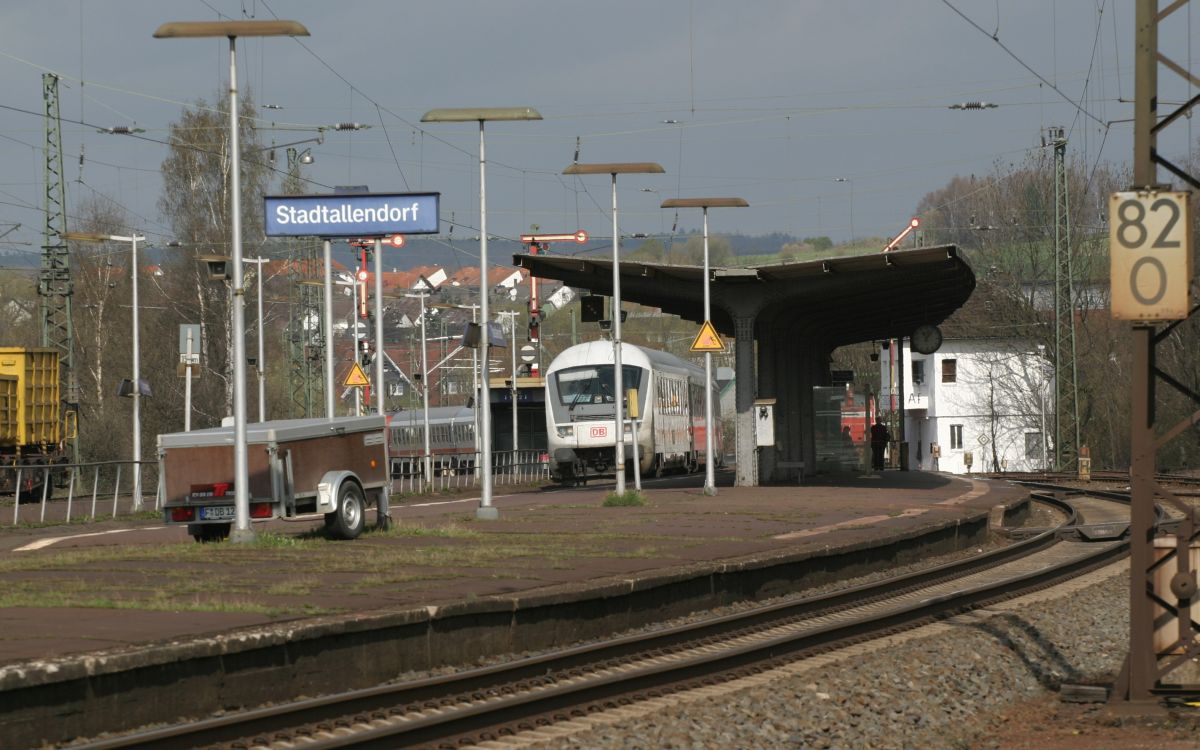 Bahnhof Stadtallendorf: Mittelbahnsteig mit durchfahrendem Intercity. Stadtallendorf, Hessen, Deutschland.